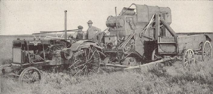 Skurtreskjar: Hart-Parr 30 med slepetreskar.